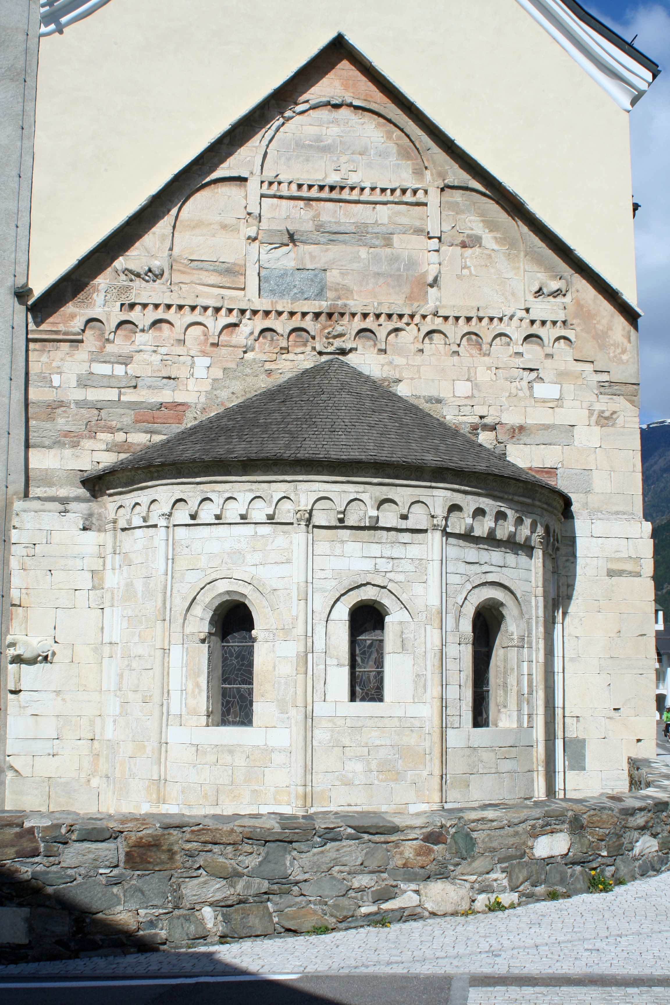 Pfarrkirche St. Johannes der Täufer in Laas (Südtirol)